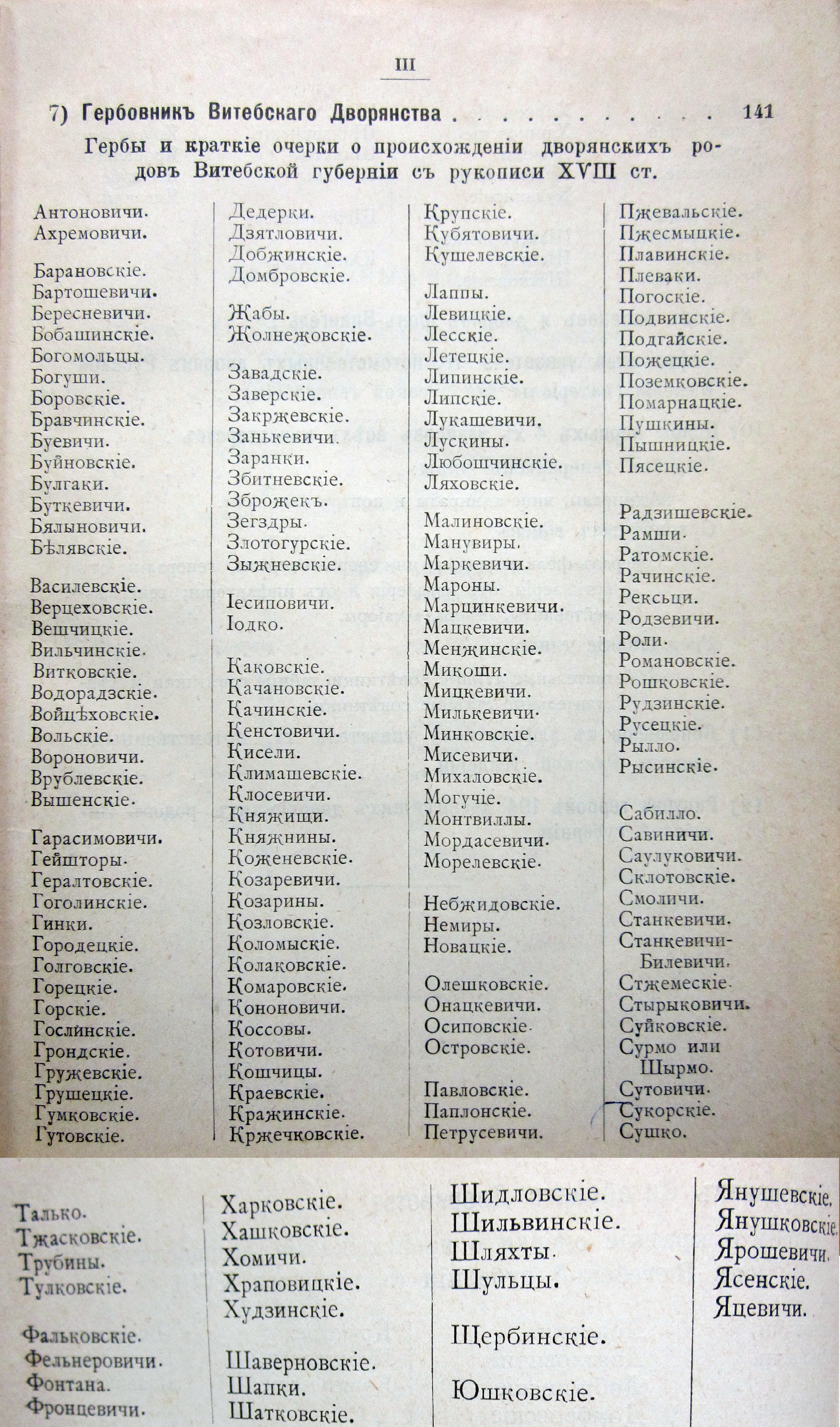 Содержание "Гербовника Витебского дворянства". Спб, 1900 год